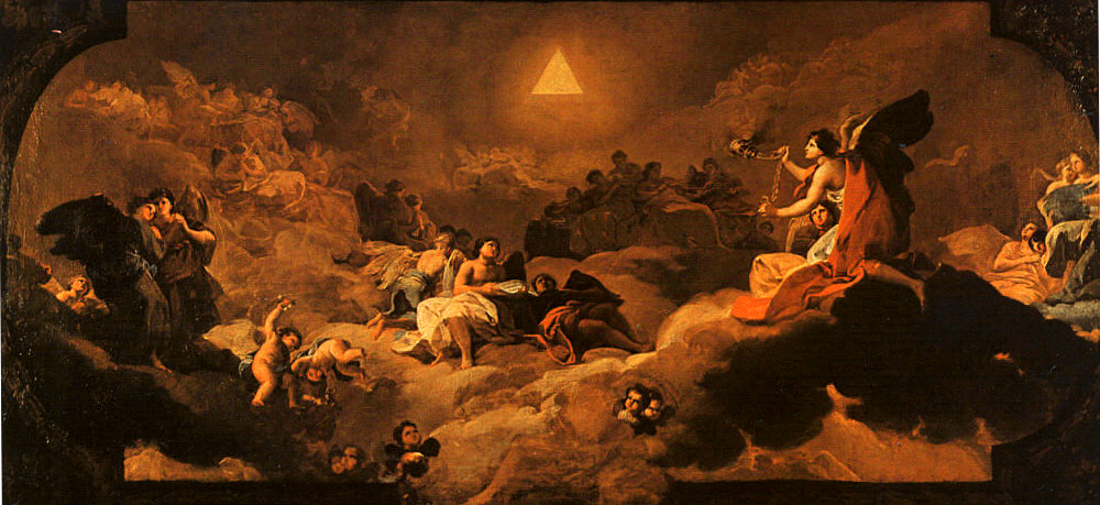 Boceto para el fresco de la bóveda del Coreto de la Basílica de Nuestra Señora del Pilar (Zaragoza)